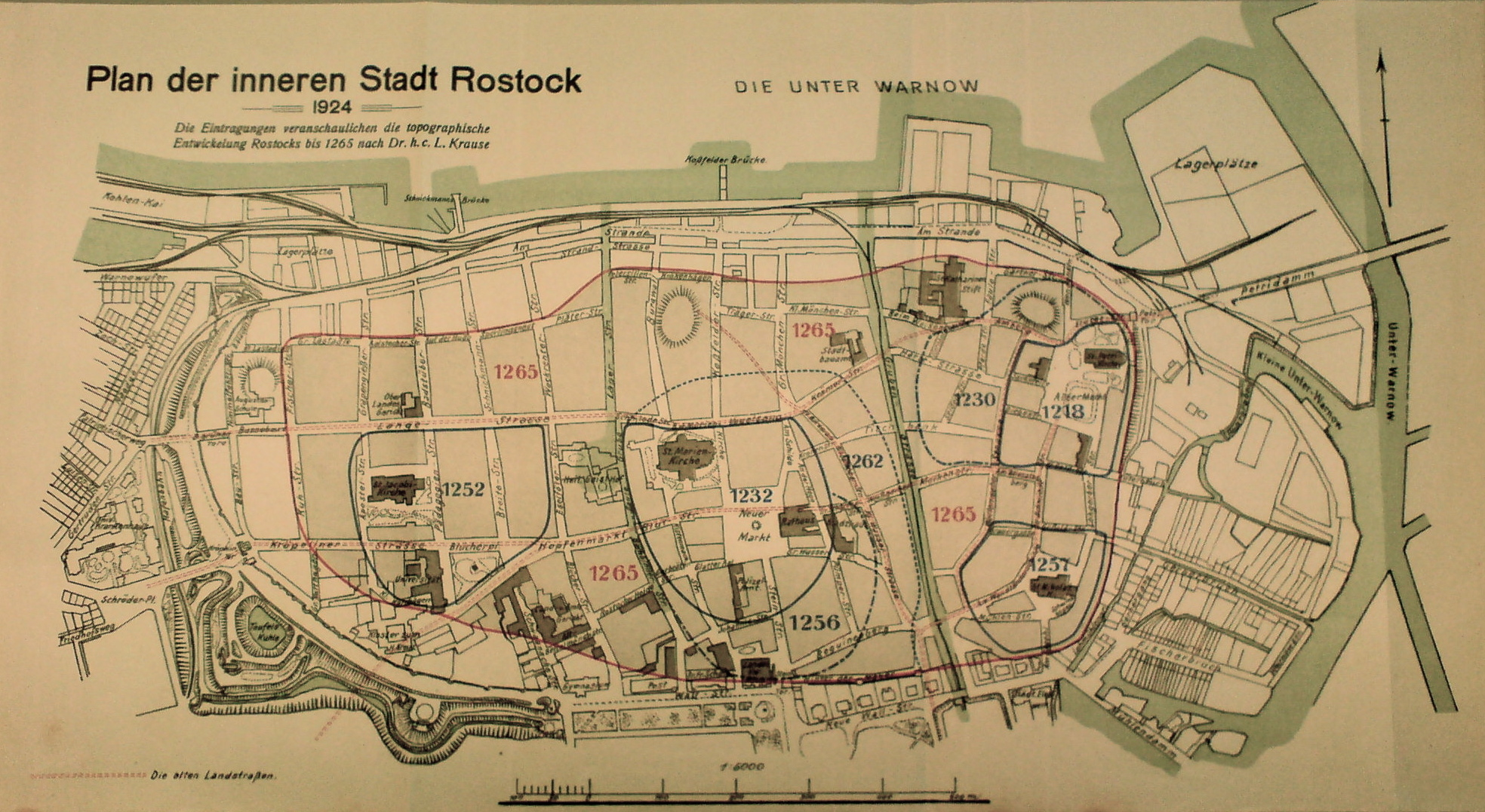 Entwicklung der Rostocker Innenstadt nach Krause